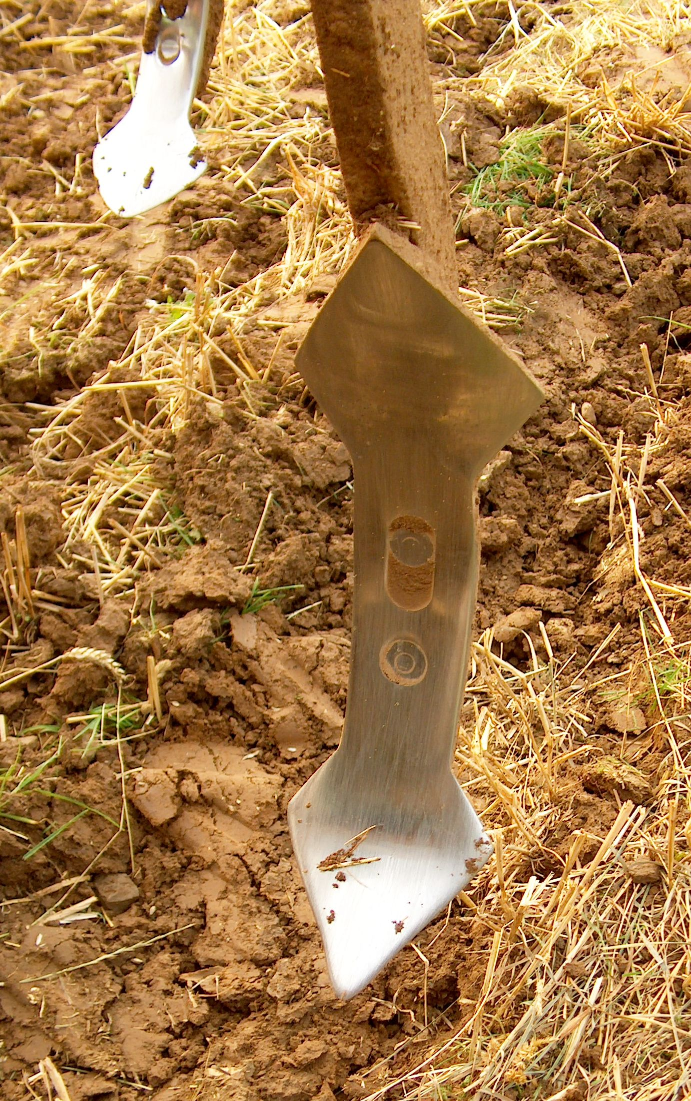 Doppelherzschar eines Grubbers